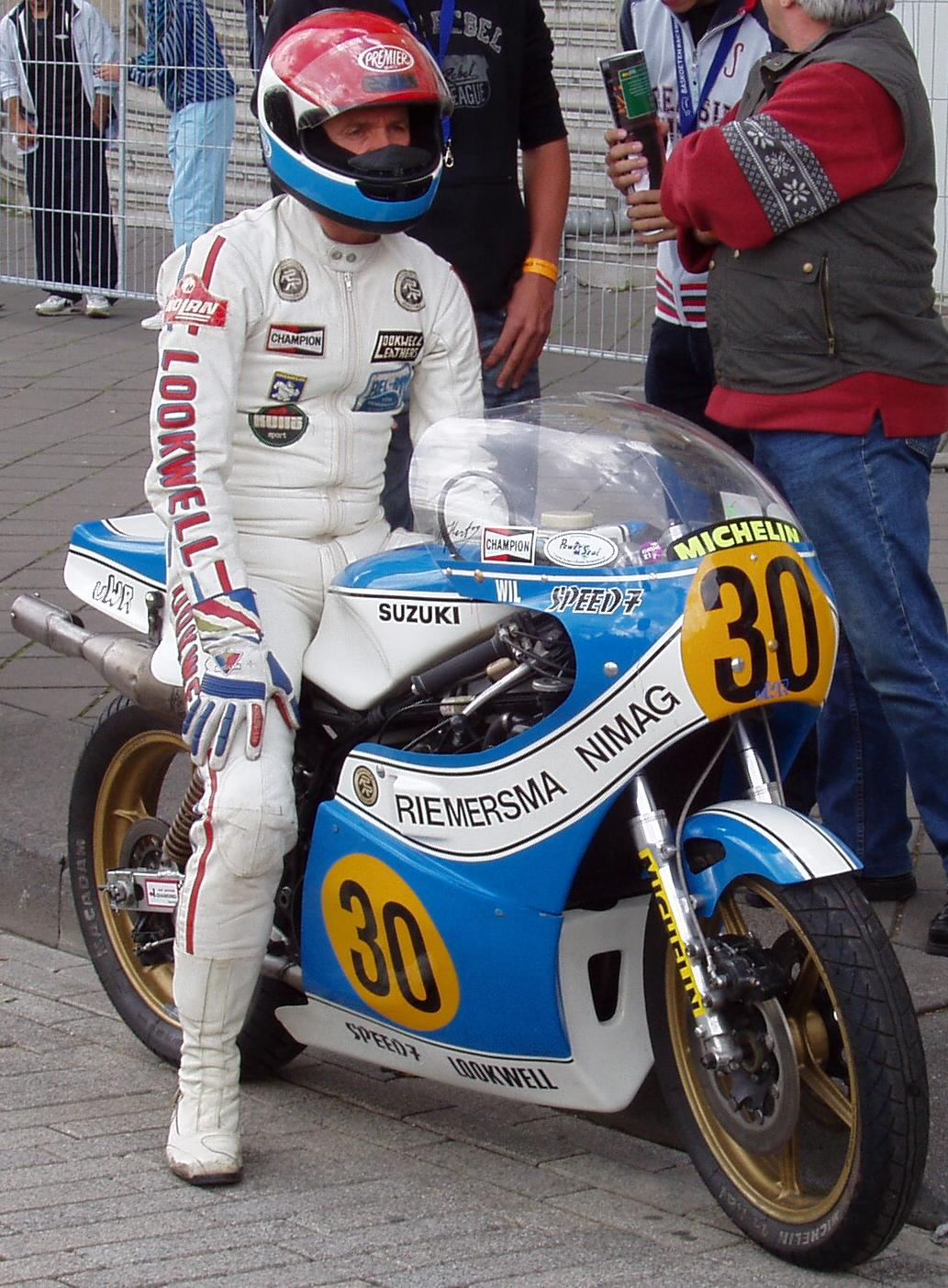 Deze foto heb ik zelf gemaakt tijdens 'Monaco aan de Maas' te Rotterdam op 7-8-2005.